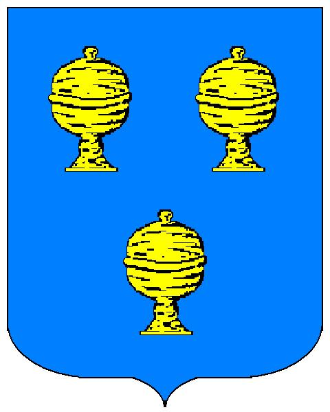 Grb obitelji Kuparić